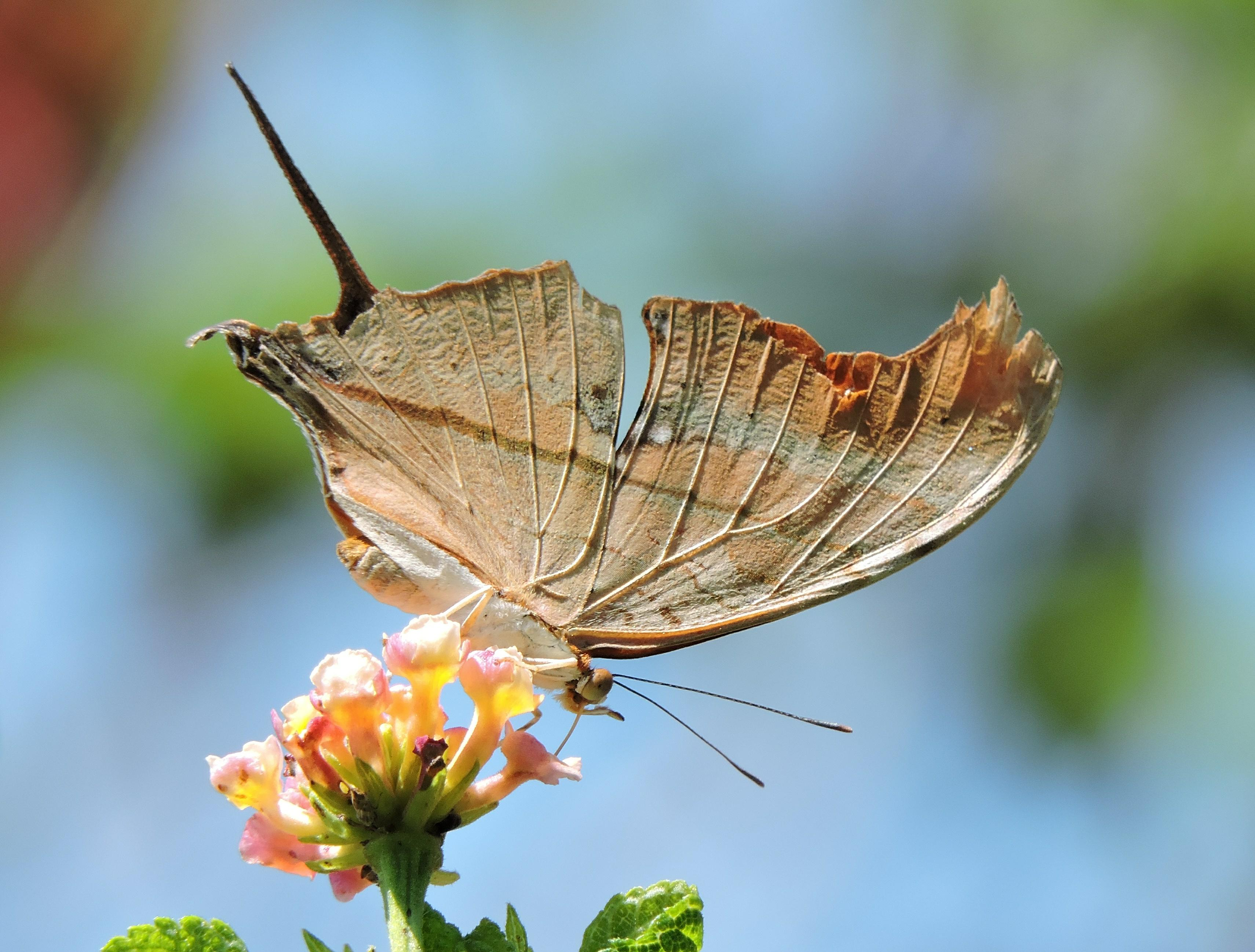 Marpesia petreus __ Pindamonhangaba SP _Brasil